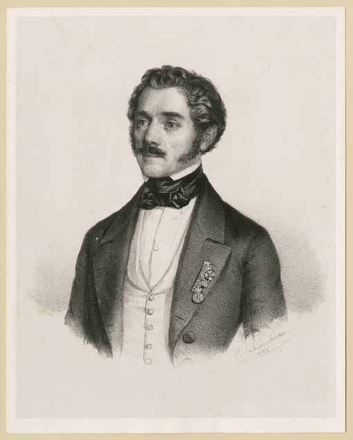 August von Frays (1790-1863) geadelter bayerischer Generalmajor und Hoftheater-Intendant